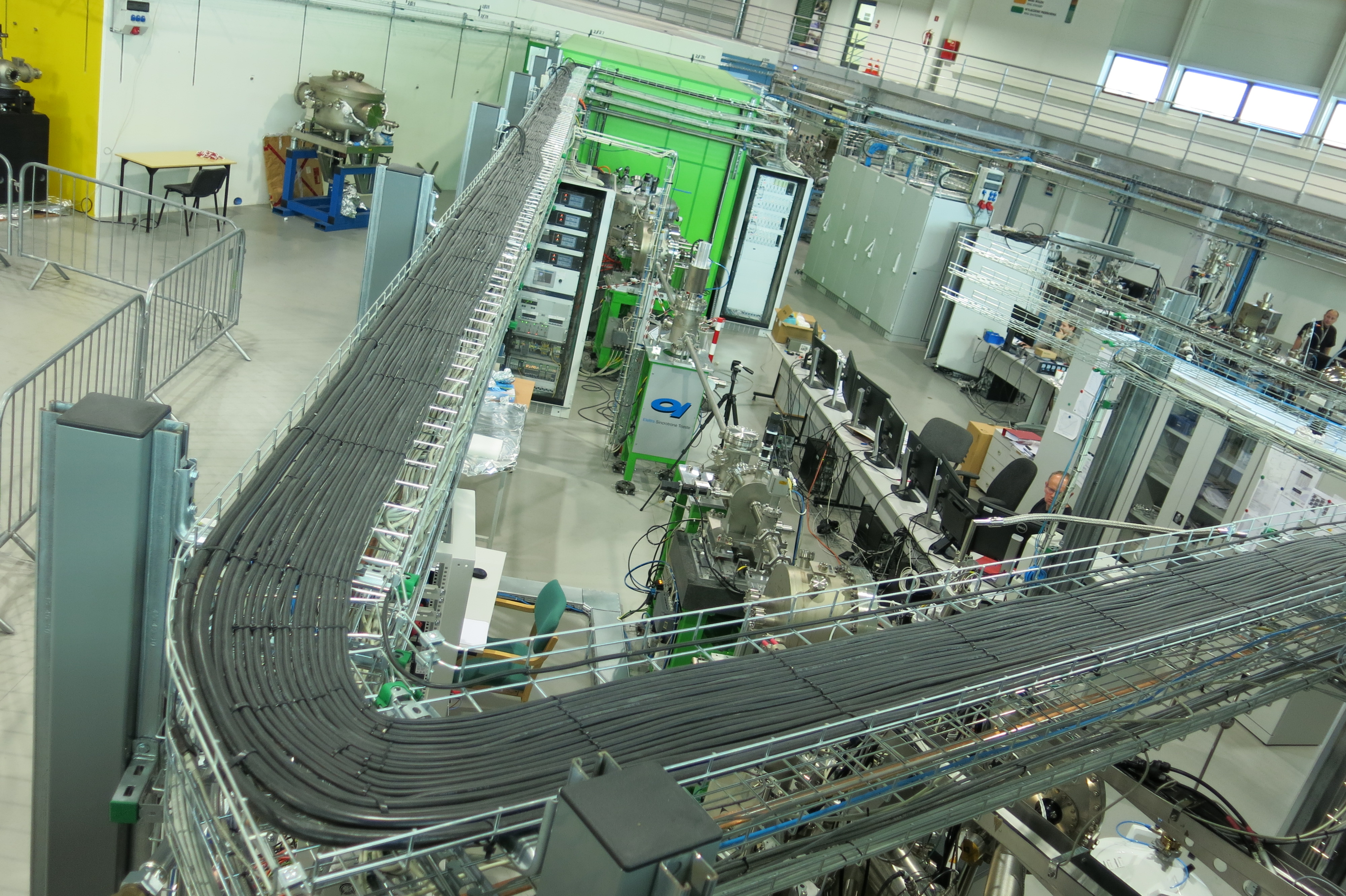 Widok na linie badawcze w synchrotronie SOLARIS